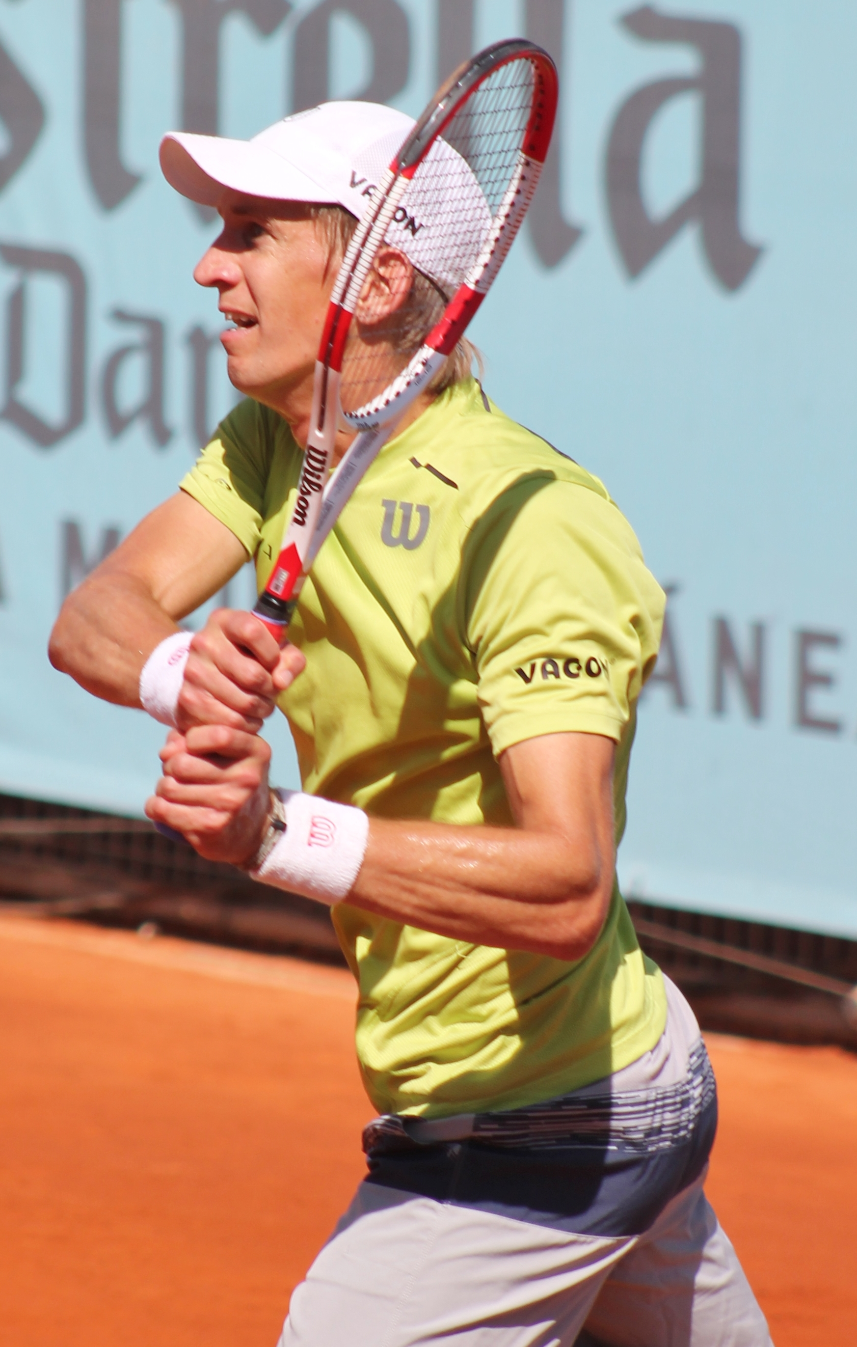 Nieminen MA14 (12)